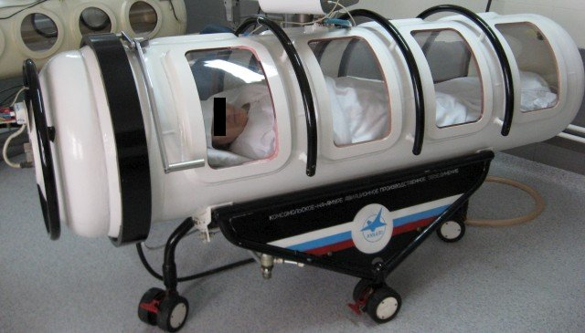 Лечење болесника у једномесној хипербаричној комори, Аутор др М.Димић, Ниш 2009.